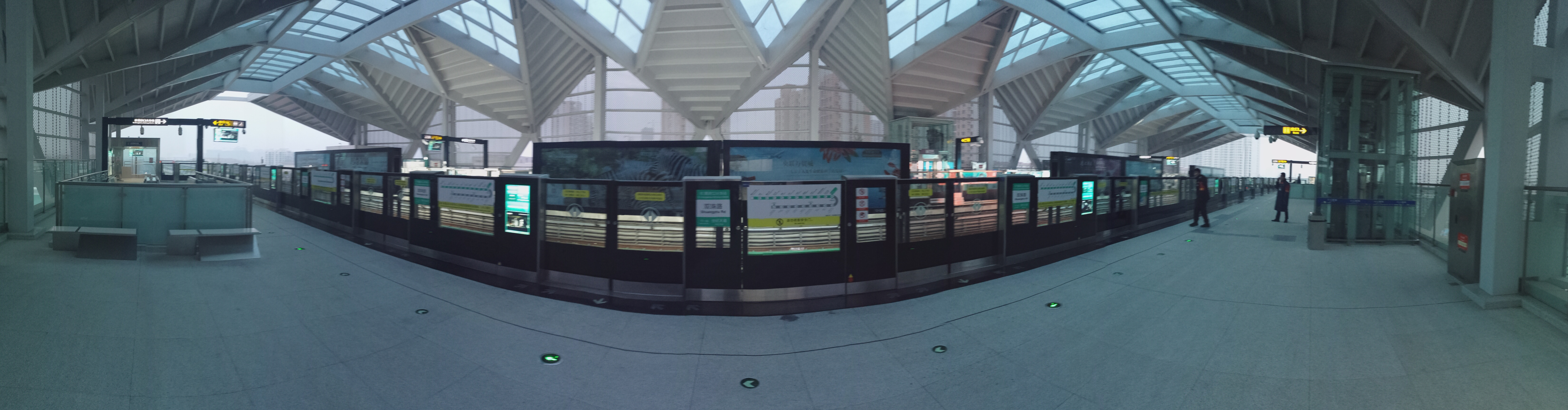 青岛地铁双珠路站站台